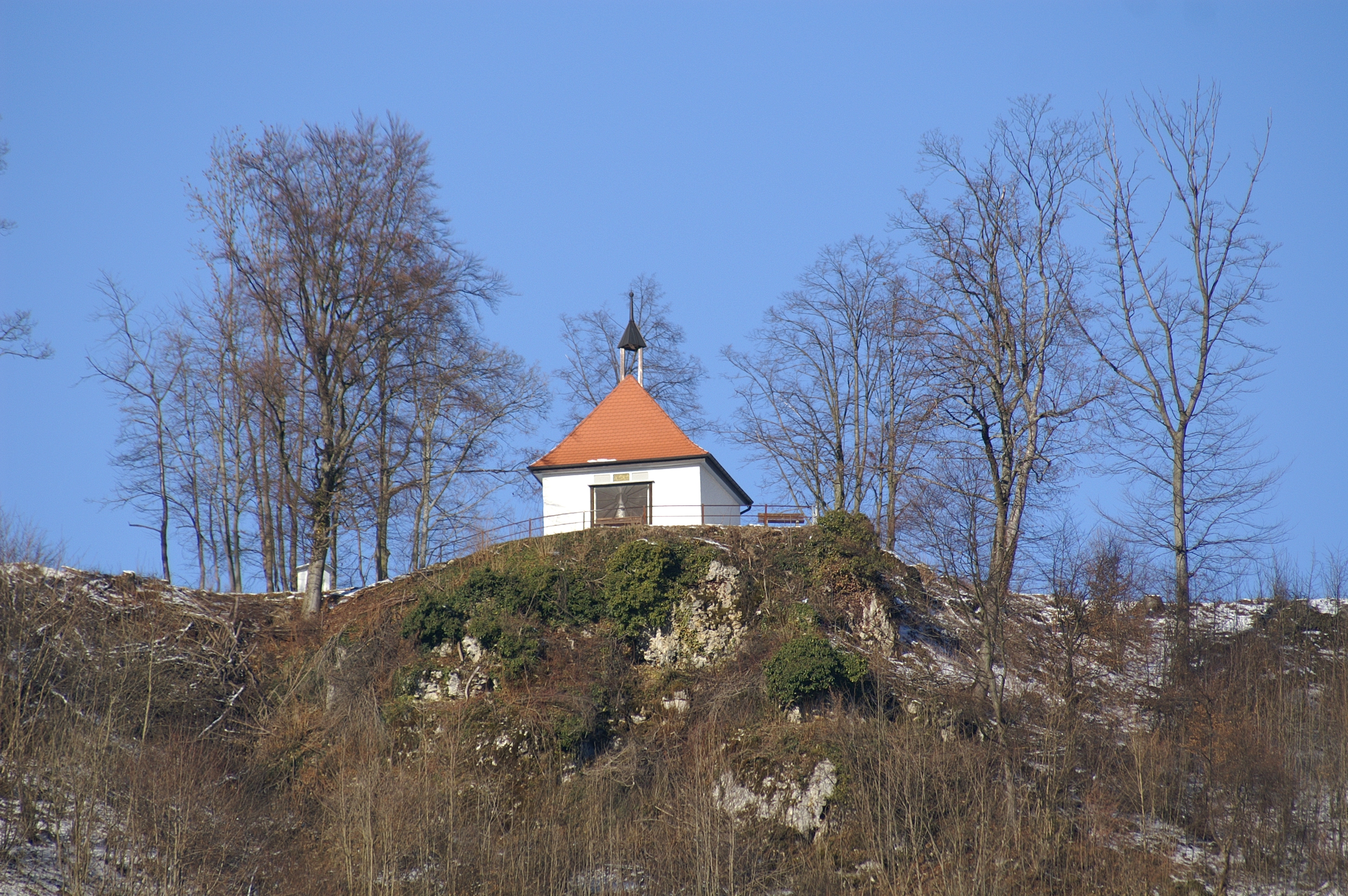 Die Kreuzkapelle steht nördlich von Wiesensteig auf der Albhochfläche